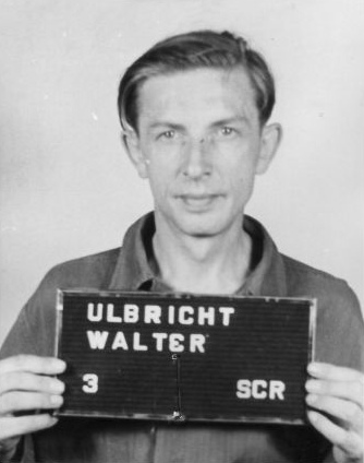 Haftbogenfoto des Angeklagten Walter Ernst Ulbricht (28.07.1904 in Leipzig-Lindenau - ?), Häftling im Konzentrationslager Buchenwald (Haft-Nr. 837), Kapo im Außenlager Rottleberode des Konzentrationslagers Mittelbau-Dora, im Dachauer Dora-Prozess am 30.12.1947 zu fünf Jahren Haft verurteilt, Dezember 1949 Entlassung.